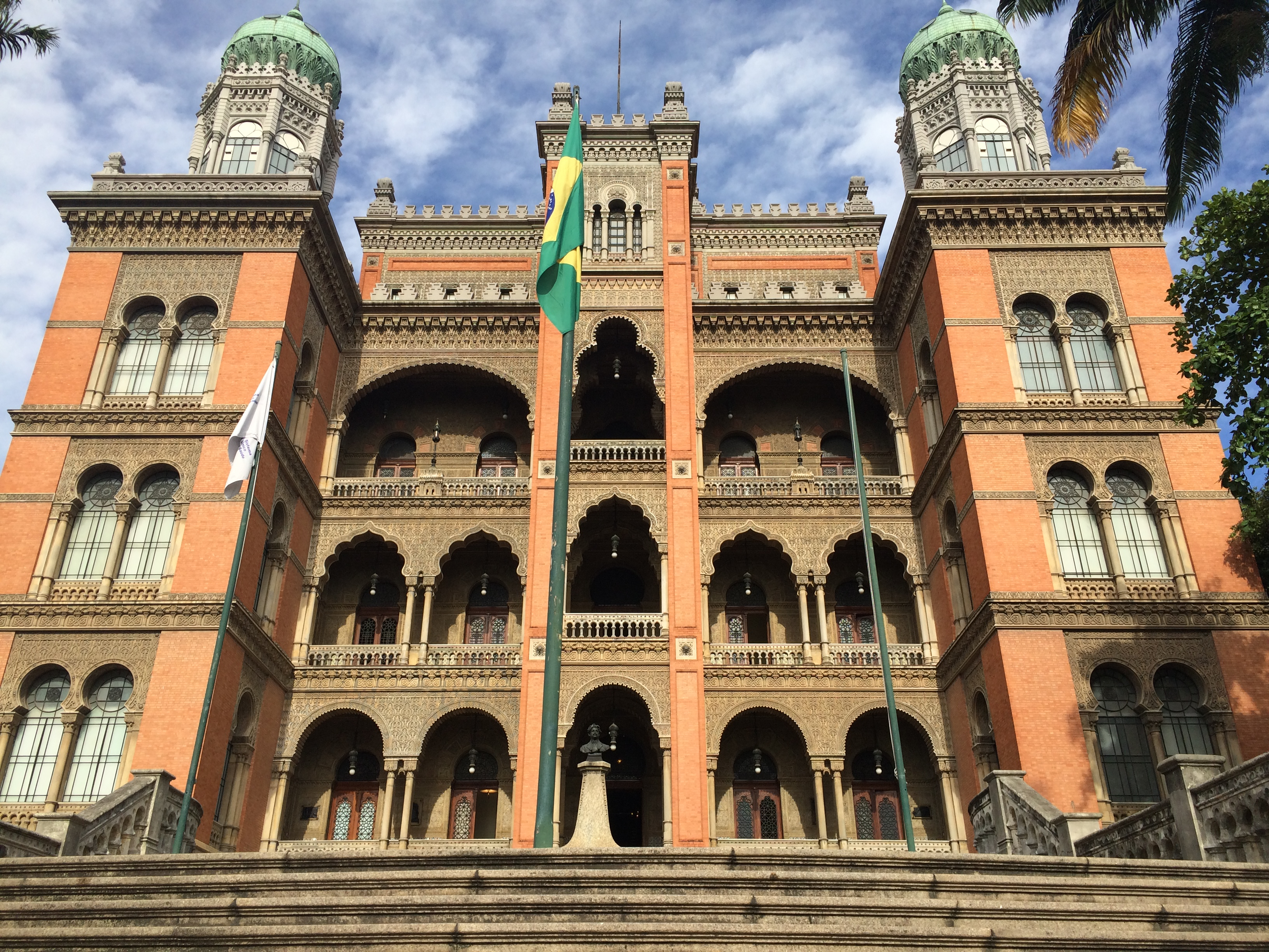 Palácio de Manguinhos ou Prédio da Fundação Oswaldo Cruz na Av. Brasil, nº 4365